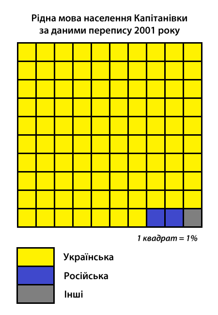 Інфографіка розподілу населення смт Капітанівка Новомиргородського району за рідною мовою згідно з даними перепису 2001 року. Джерело: Розподіл населення Кіровоградської області за рідною мовою (у % до загальної чисельності населення) за переписом 2001 року